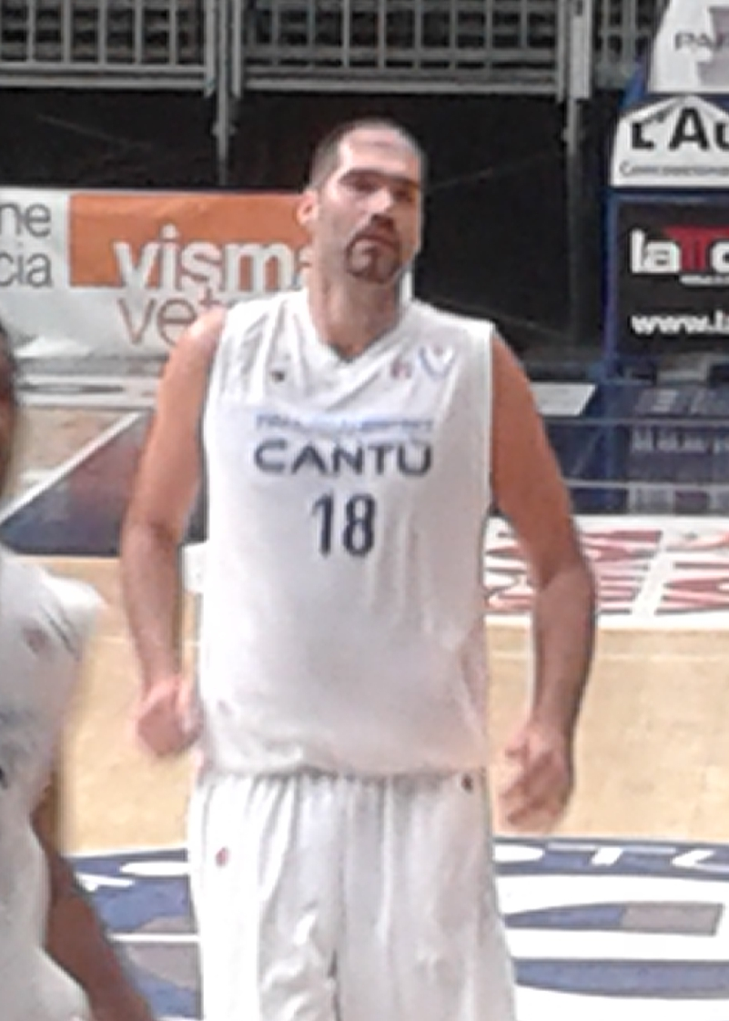 Roberto Chiacig con la maglia di Cantù nel pre-campionato 2013